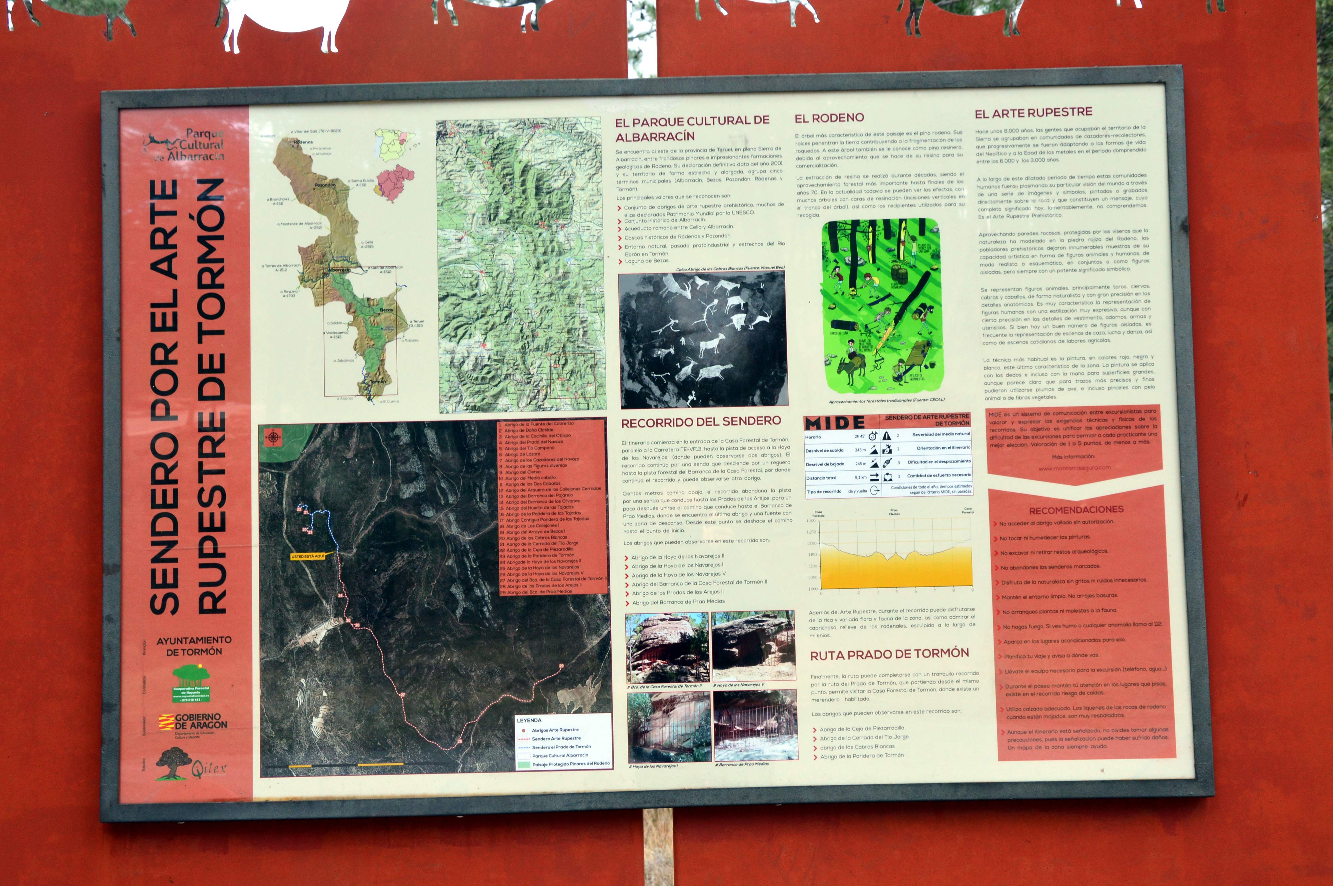 Detalle de tablón de contenidos del Sendero de Arte Rupestre de Tormón, Parque Cultural de Albarracín (2018).